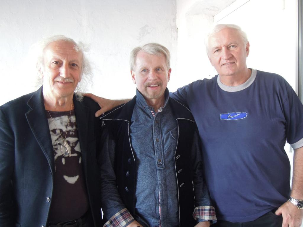 ВИА «Пламя» под руководством Юлии Ариничевой.